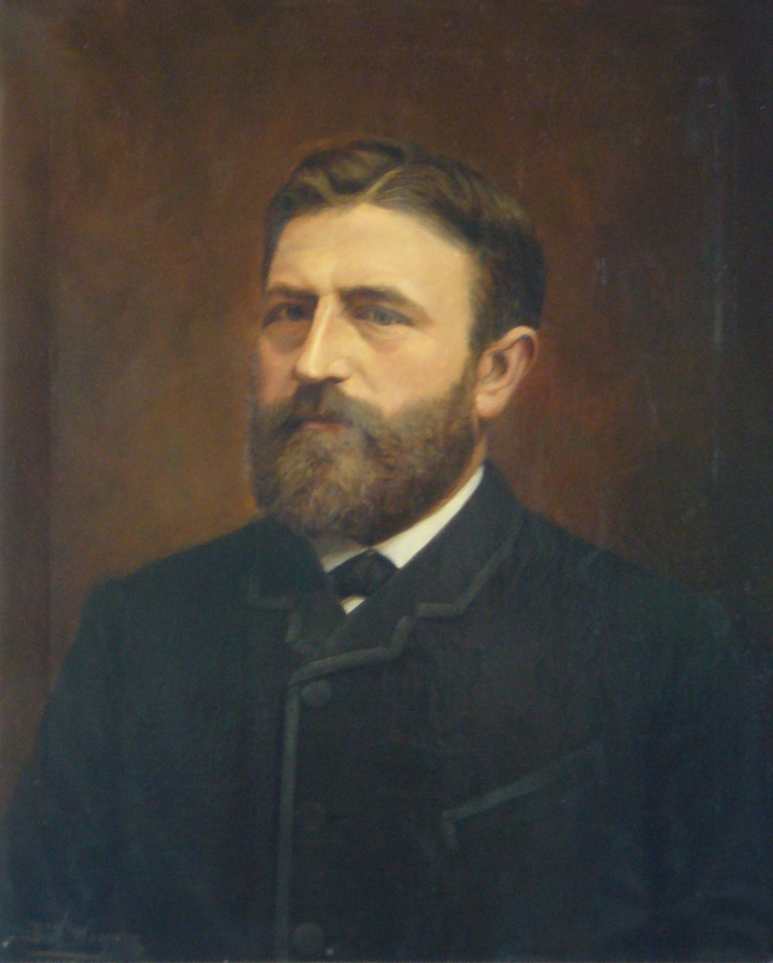 Henk Pander, portret